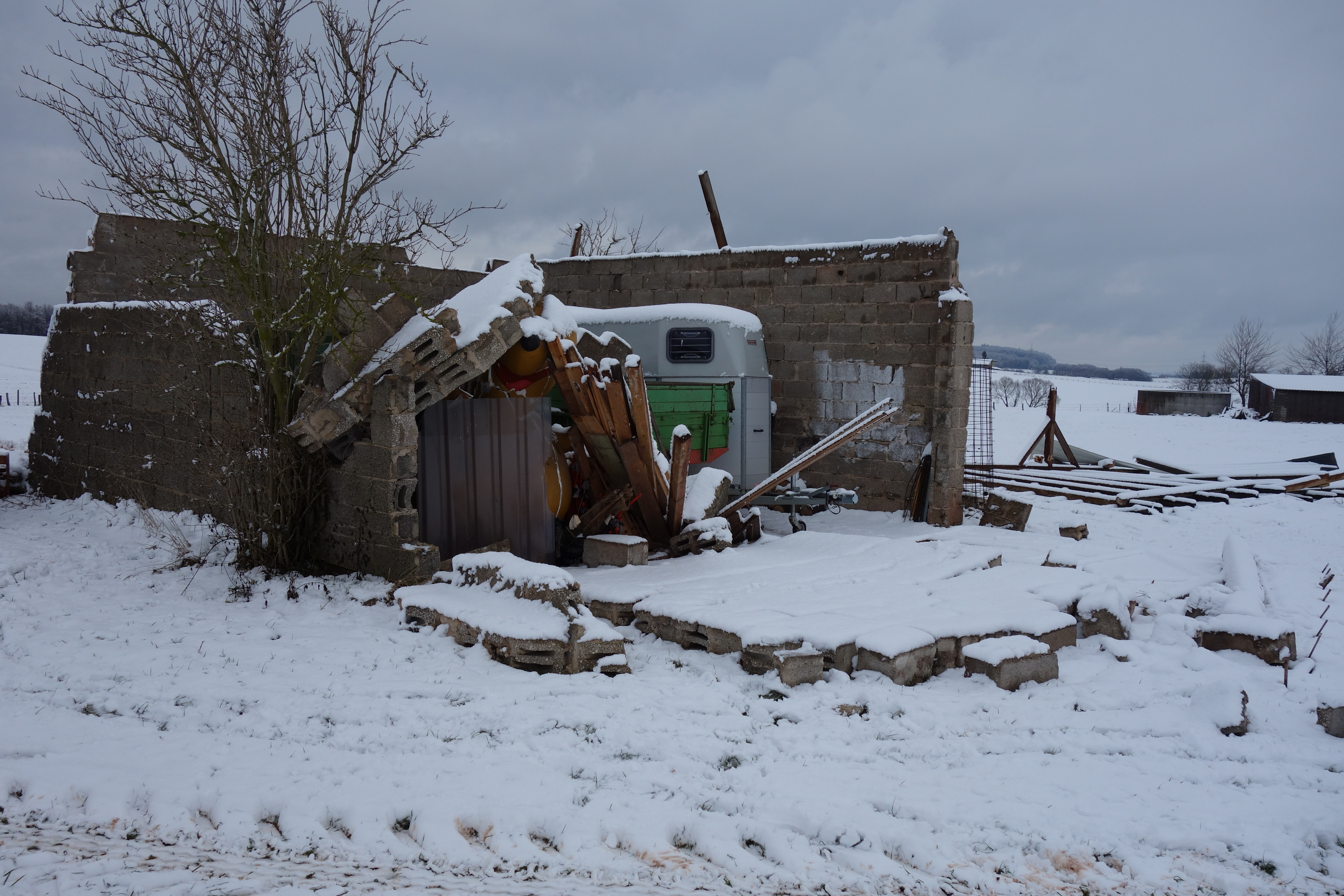 Scheune südlich Marsberg-Giershagen, wo der Orkan Friederike am 18. Januar 2018 das Dach fortriss, das Tor umriss und Teile der Mauern zum Einsturz brachte.